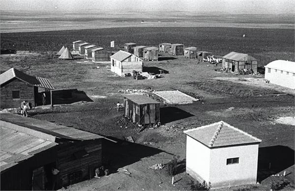 חפץ - חיים - מראה כללי